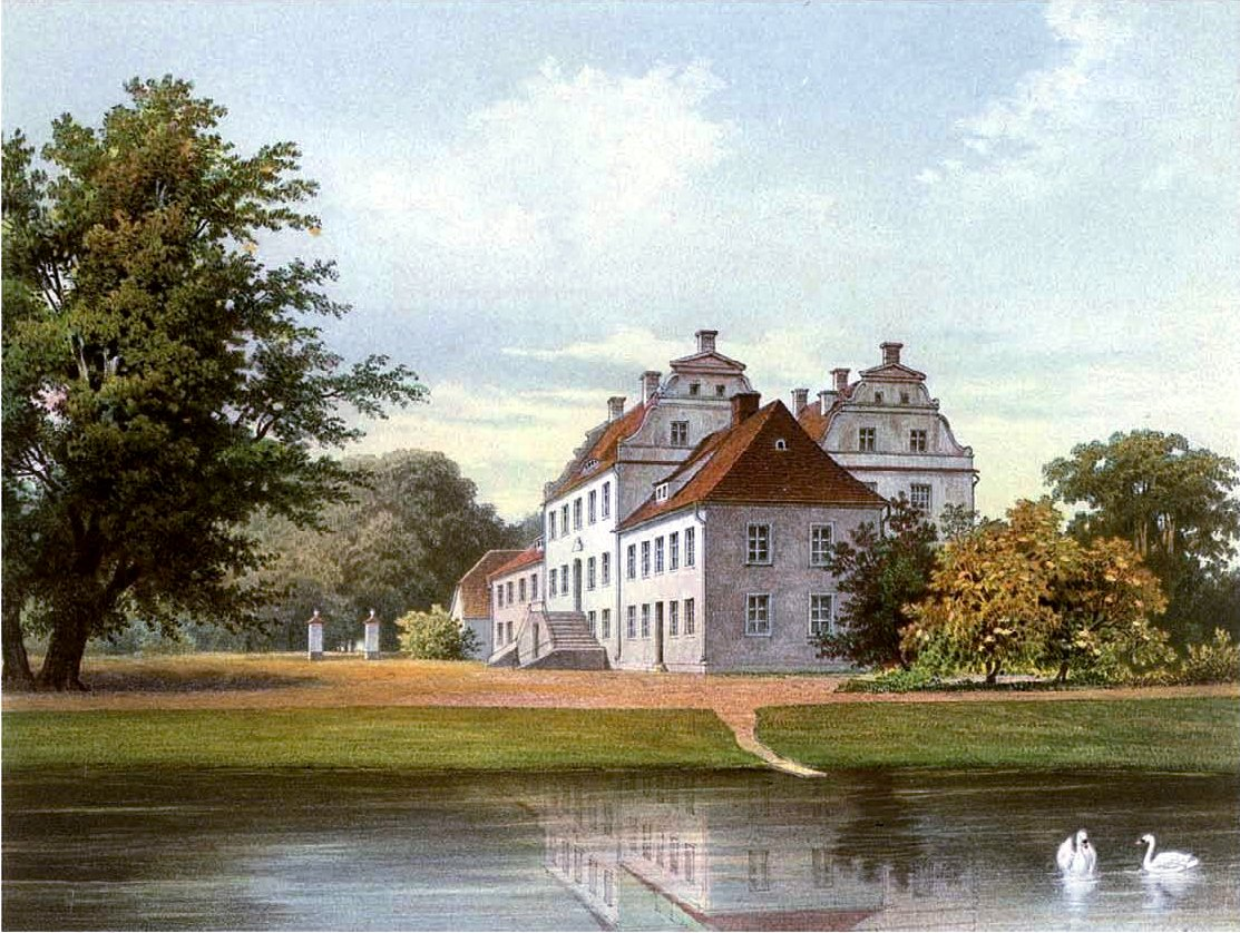 Gutshaus Boldewitz, Kreis Rügen, Provinz Pommern